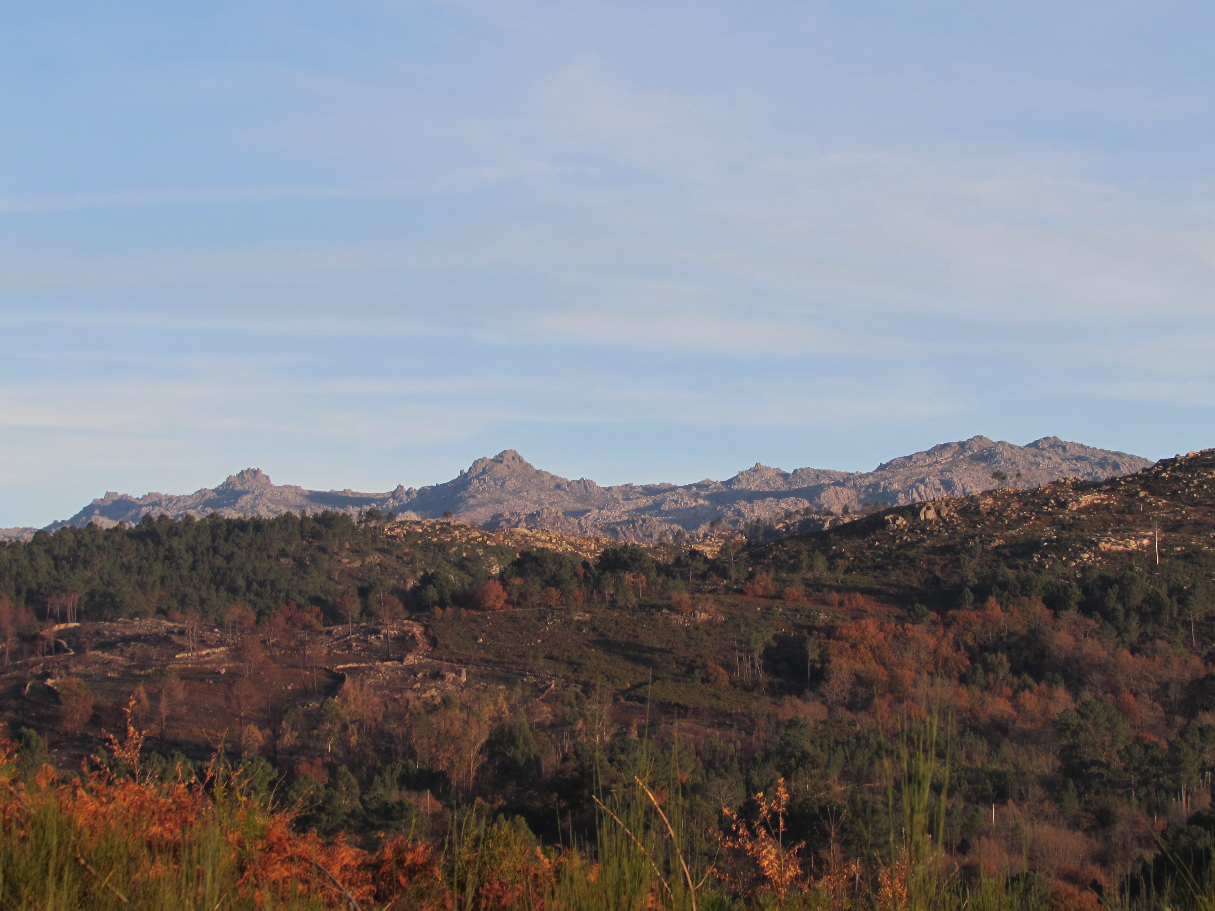 Picos de Fontefría, na Serra do Xurés.